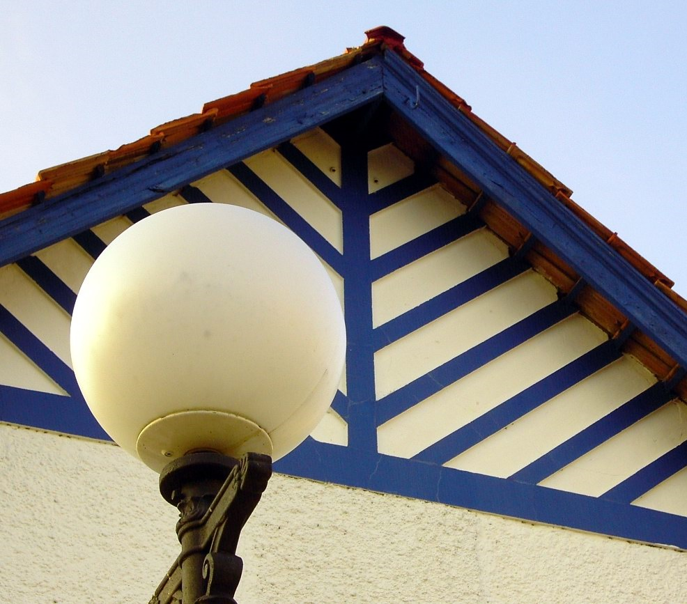 Barrio Obrero (detalle)